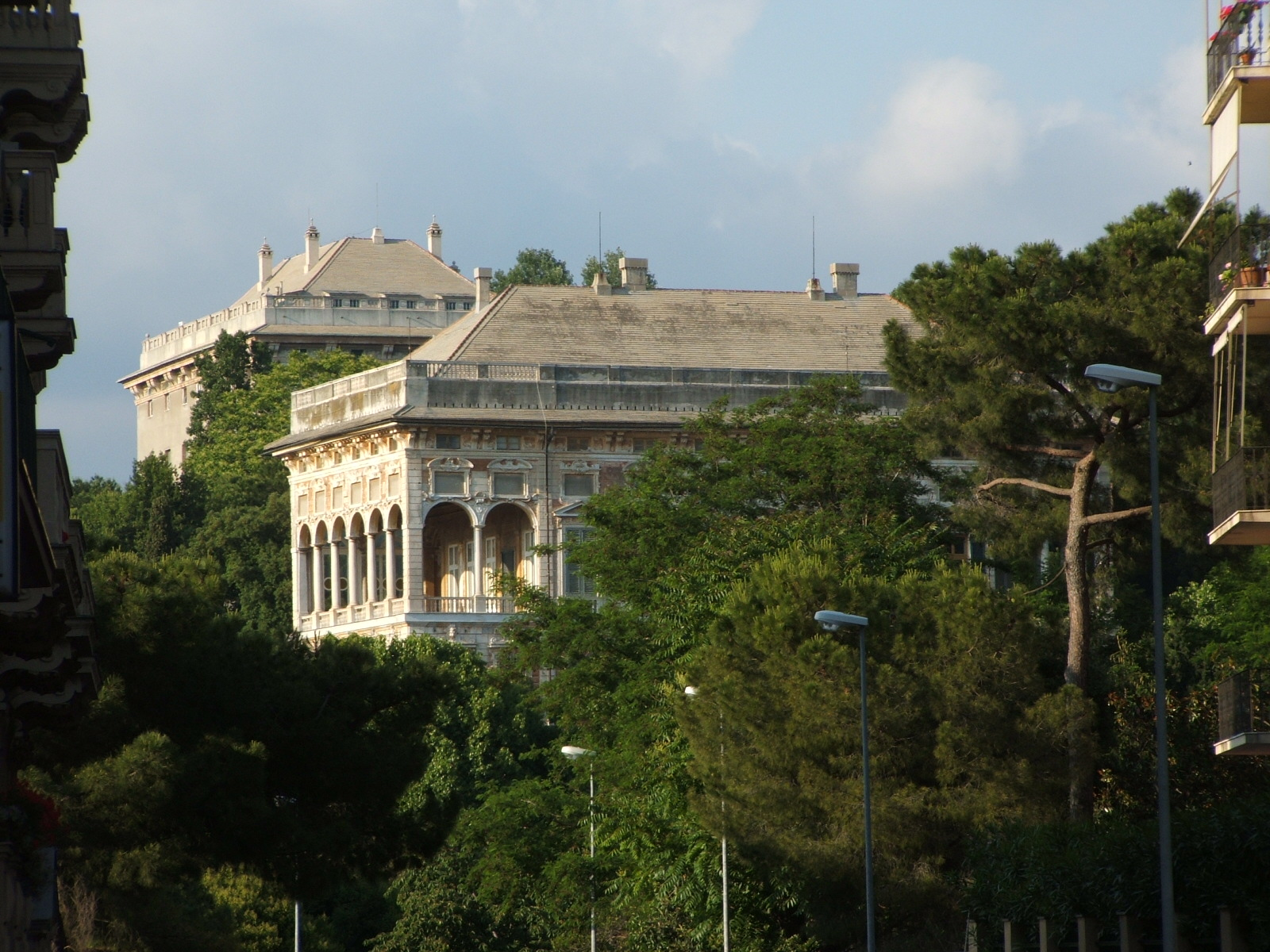 Genova, quartiere di Albaro